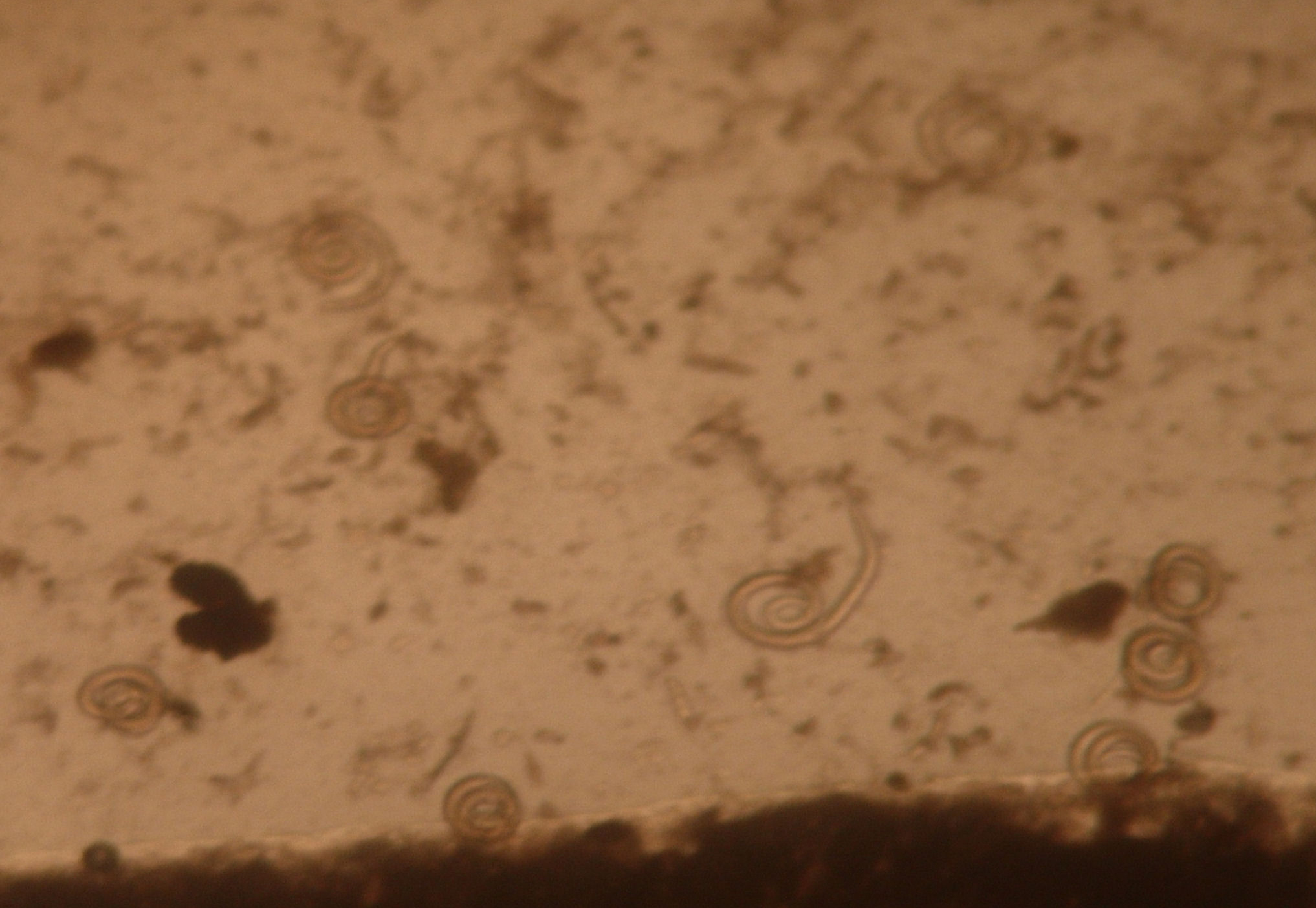 Trichinella Spiralis observada en triquinoscopios, después de la digestión artificial. La muestra pertenece a carne de jabalí. La imagen fue tomada por un veterinario habilitado en una sala de tratamiento de caza, en la provincia de Jaén. La carne procede de un jabalí abatido en una montería.